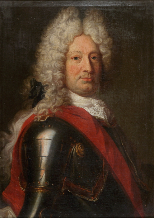 Bildnis Maximilian von Mentzingen (1635-1708), württembergischer Feldmarschall und Geheimer Rat.